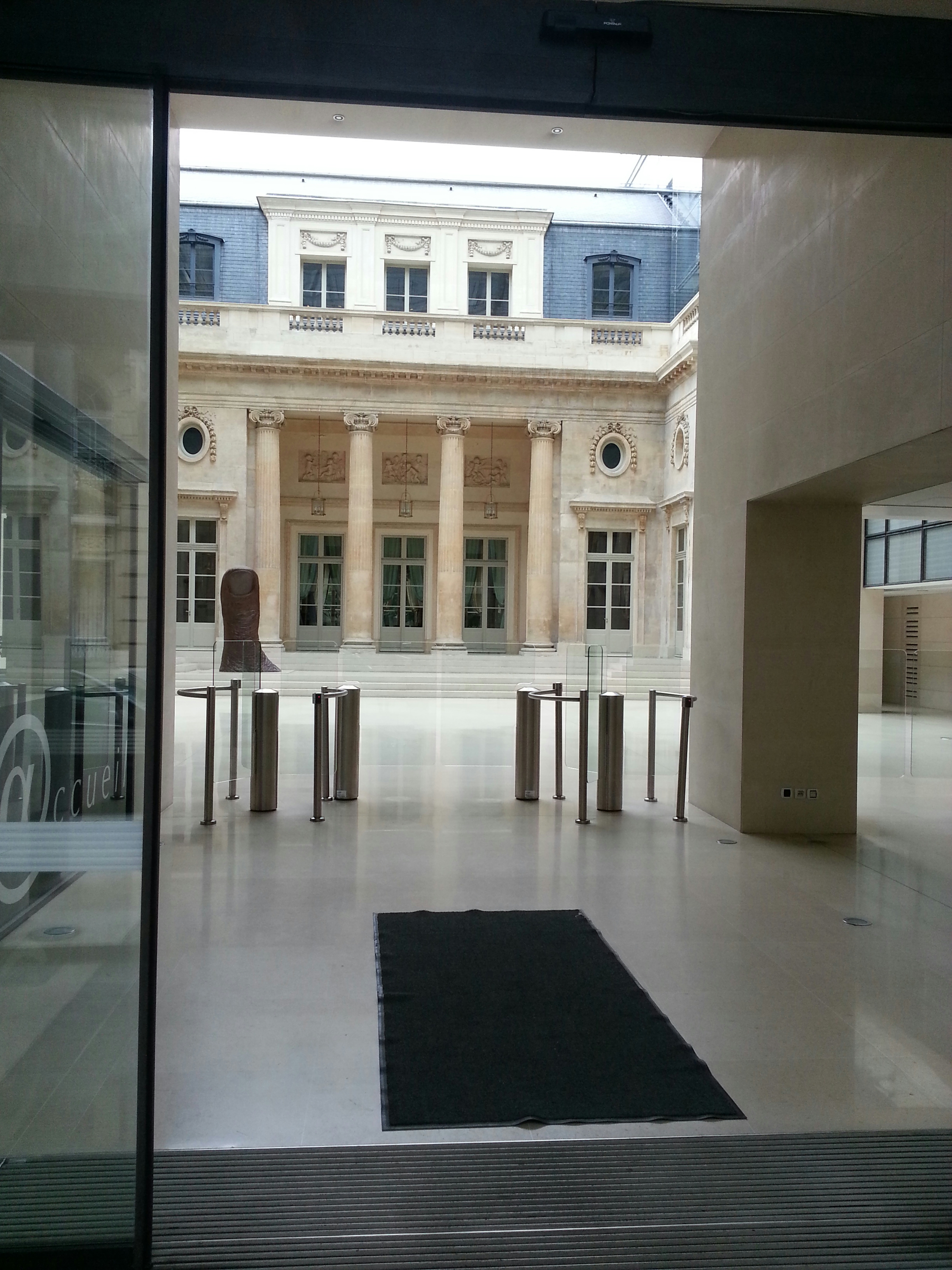 Immeuble .